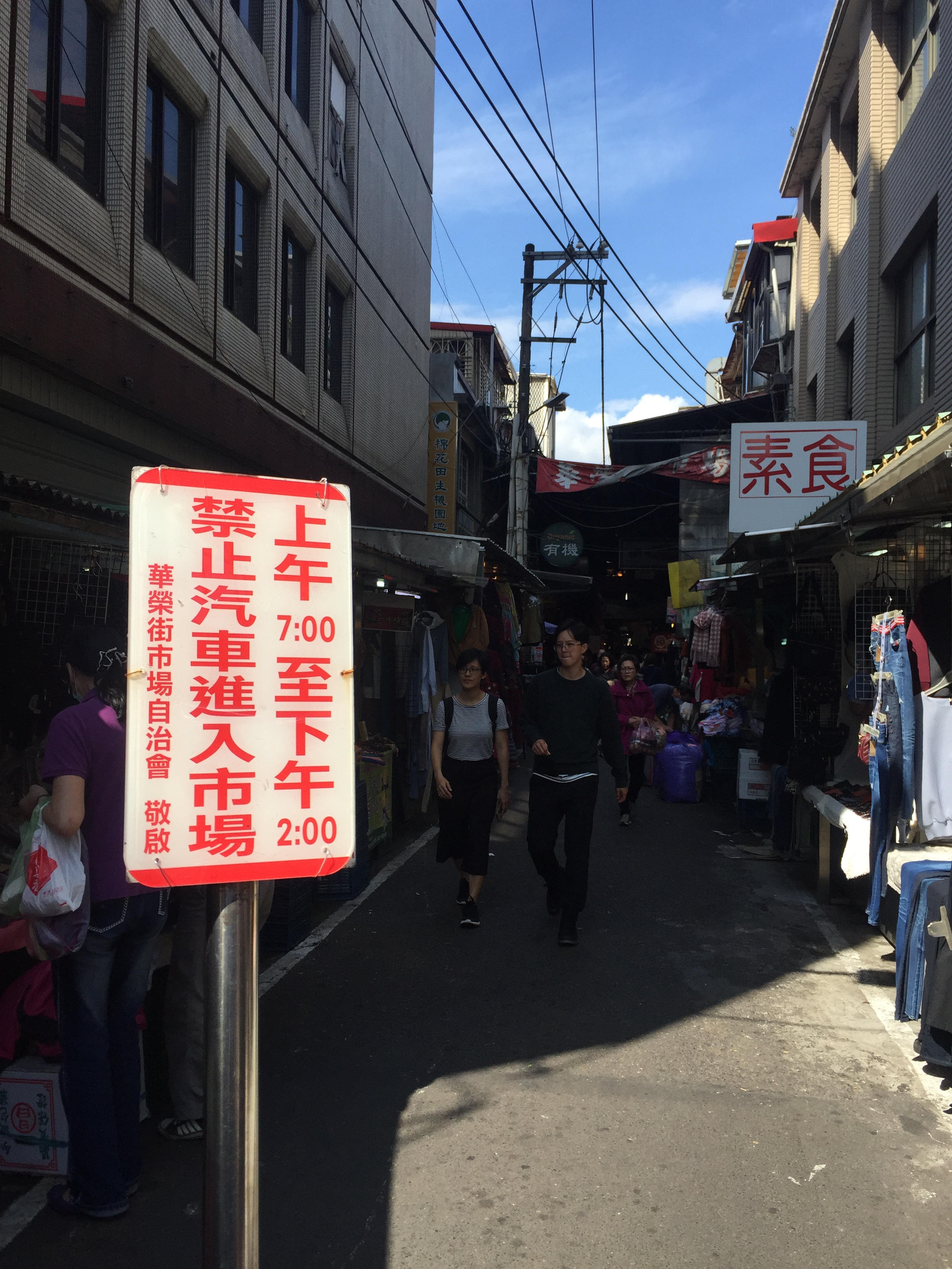 台灣台北市士林區華榮街口華榮市場告示牌